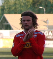 Eirik Markegård, norsk fotballspiller